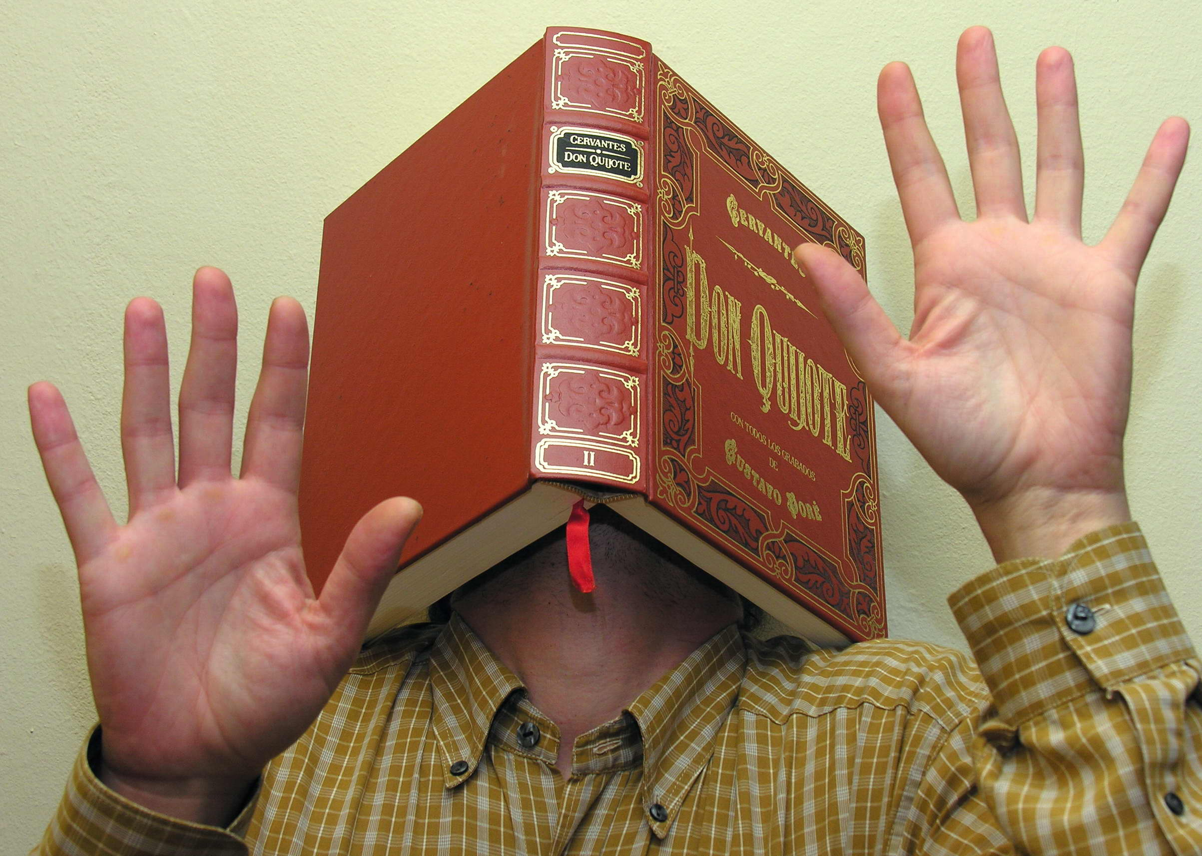 Paixón pola lectura